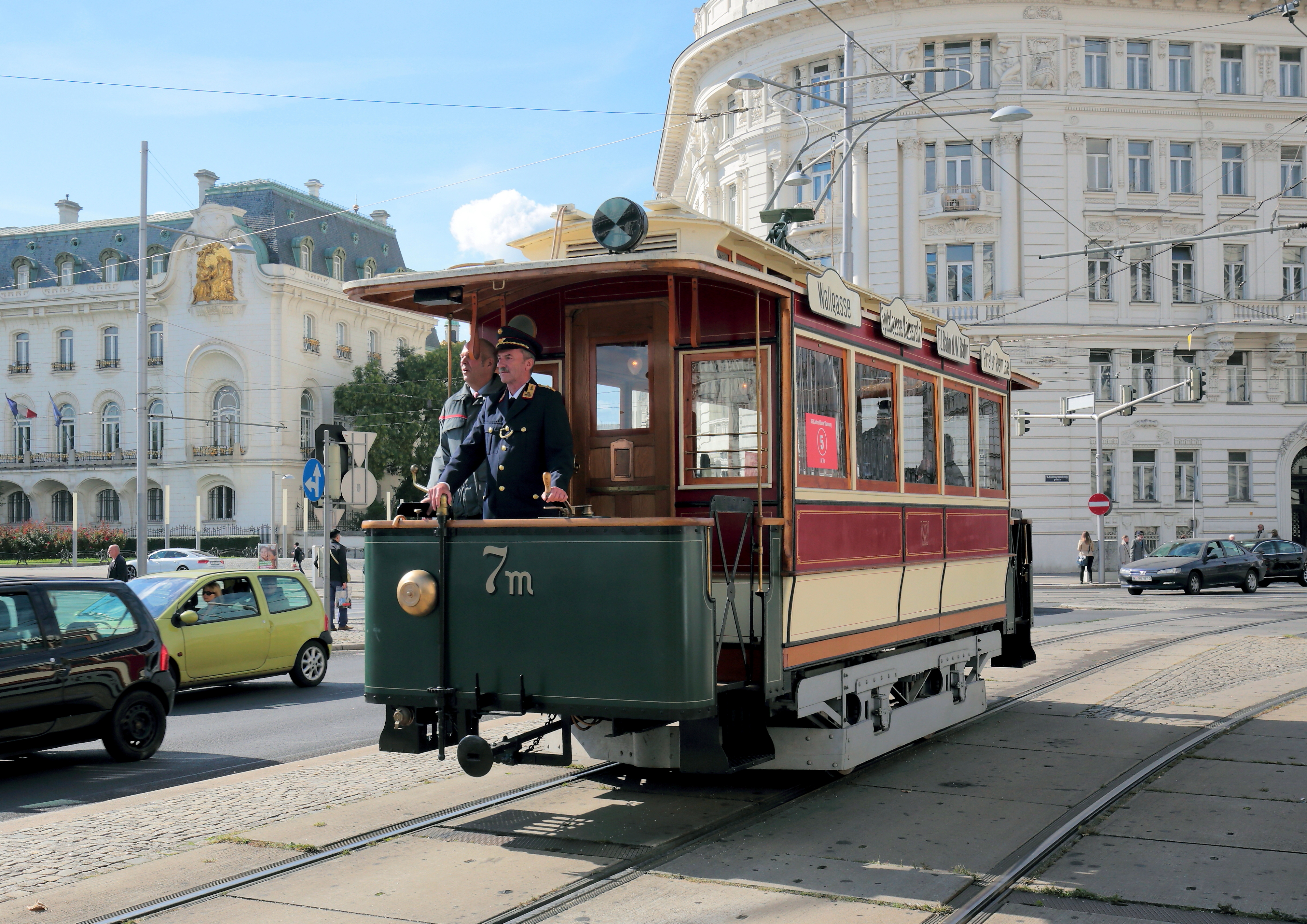 Der im Jahr 1896 von der Grazer Waggon- & Maschinen-Fabriks-Aktiengesellschaft vorm. Joh. Weitzer gefertigte Triebwagen Type A Nummer 7m. Dieser Typ an Triebwagen wurde bei der ersten Wiener „elektrische“ Straßenbahn eingesetzt. Eröffnet wurde die erste Wiener „elektrische“ Straßenbahn am 28. Jänner 1897 auf der Strecke Vorgartenstraße - Praterstern - Wallgasse (heutige Linie 5). Der teilweise rekonstruierte Triebwagen ist hier im Zuge der Veranstaltung "150 Jahre Wiener Tramway" nächst Schwarzenbergplatz in Wien auf Schiene.